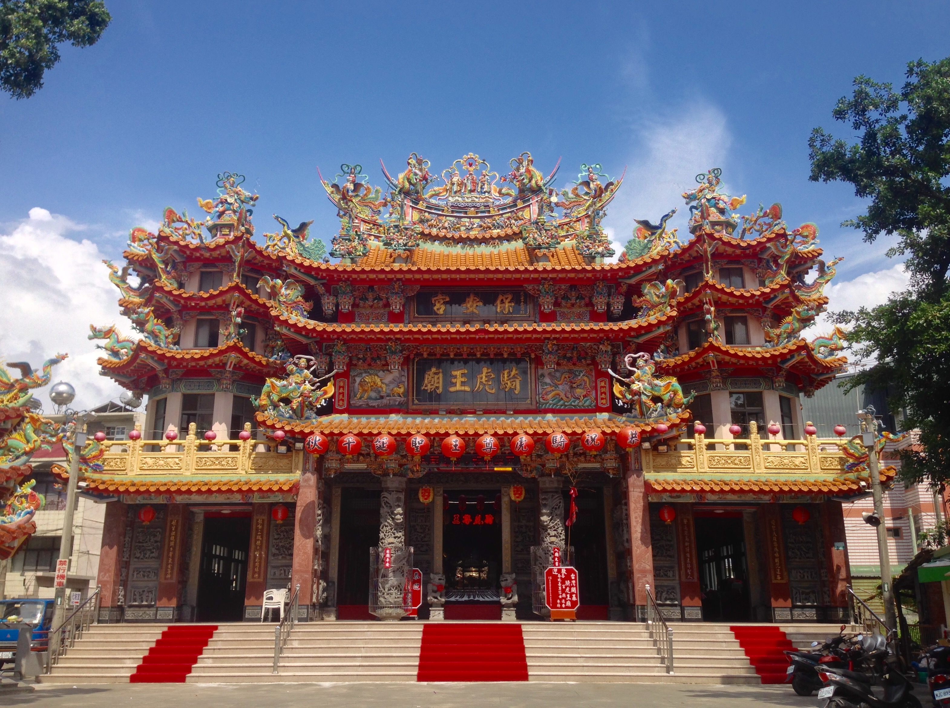 騎虎王廟正面照